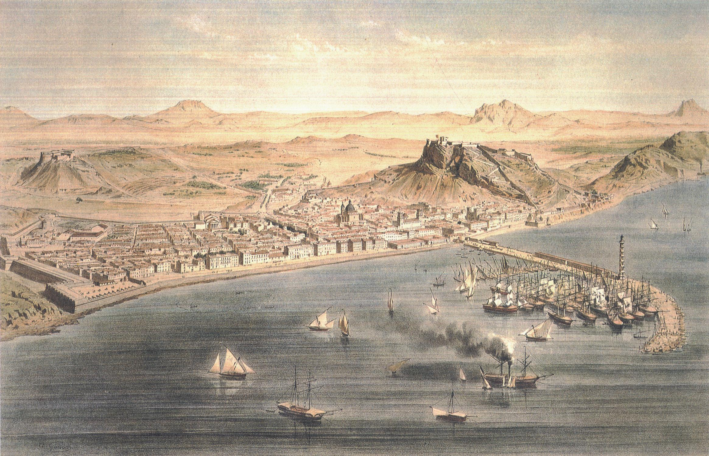 Vista de la ciutat d'Alacant l'any 1832 (o a mitjans del segle XIX), País Valencià.